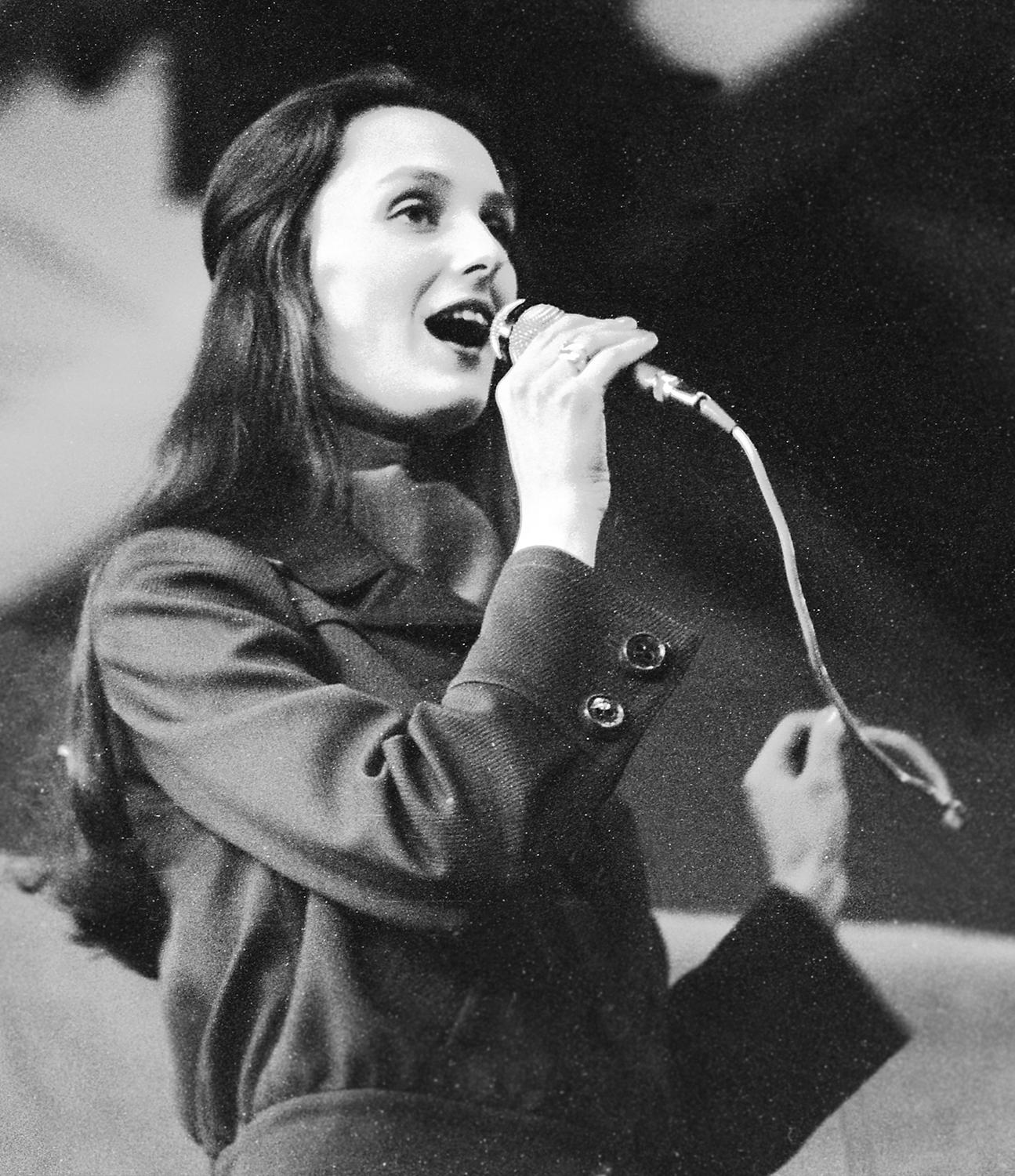 Faime Jurno, eesti näitleja ja modell 74